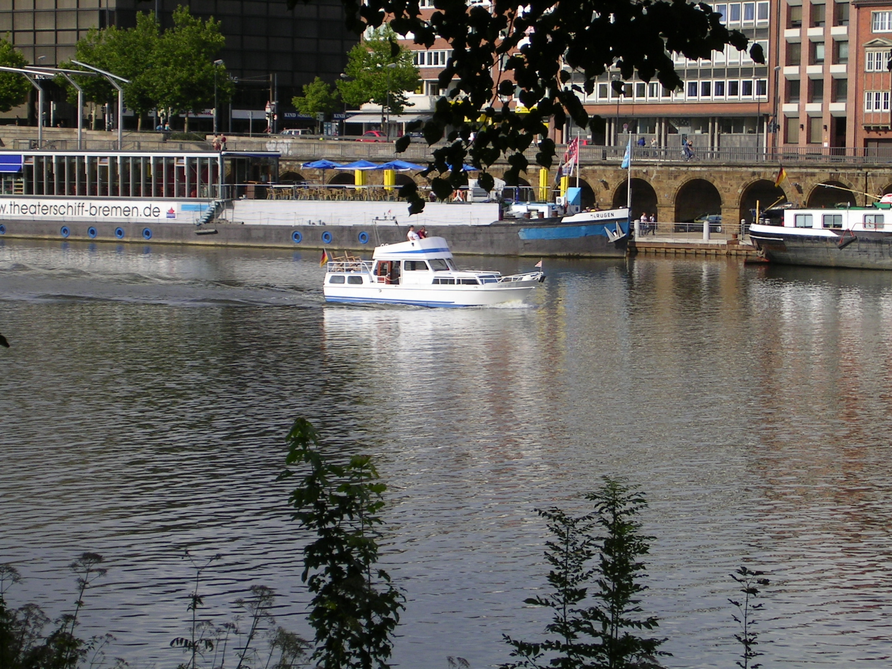 die Straße Tiefer in Bremen mit Theaterschiff und Windspiel von Hein Sinken